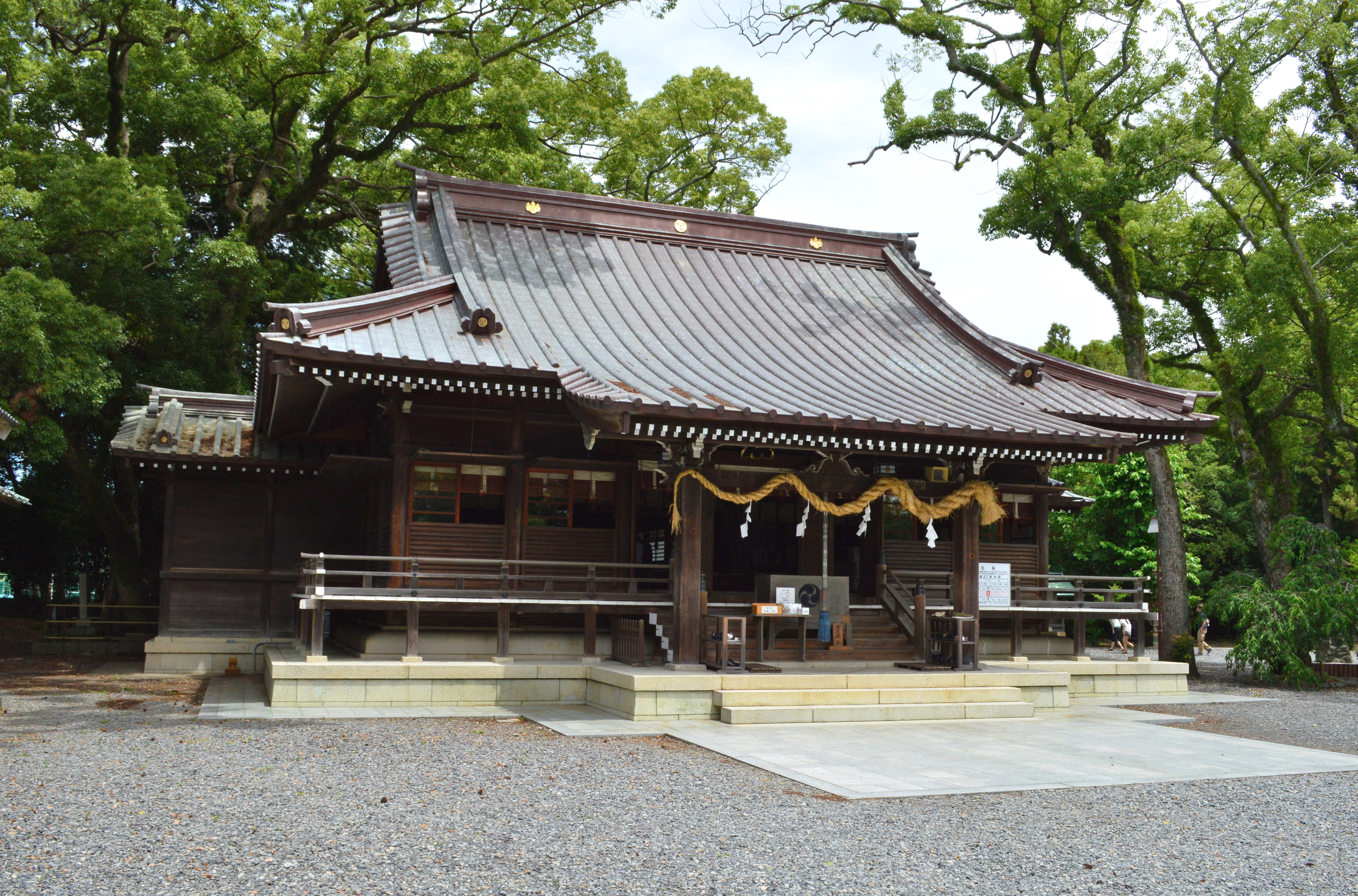 焼津神社 拝殿